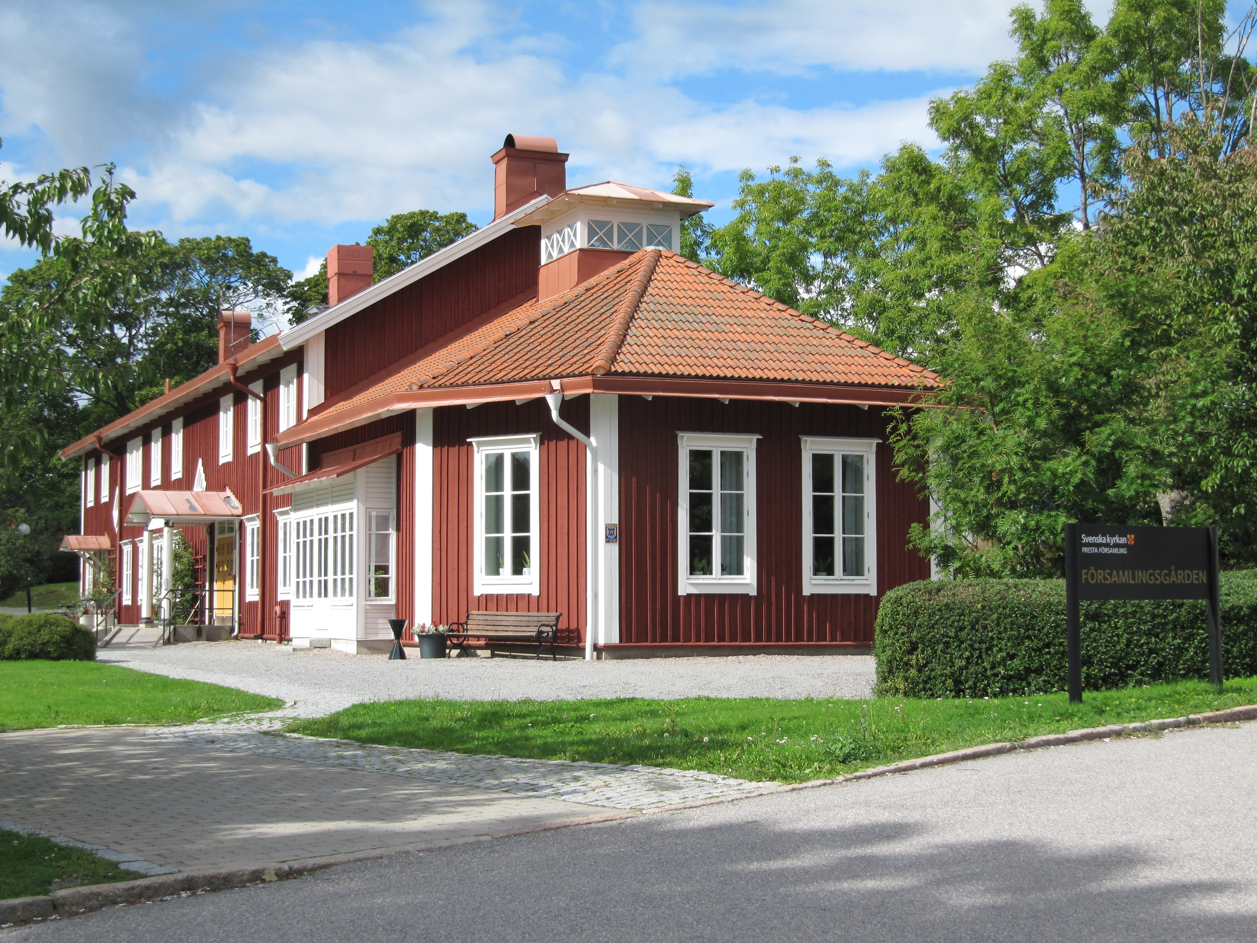 Församlingsgård väster om Fresta kyrka